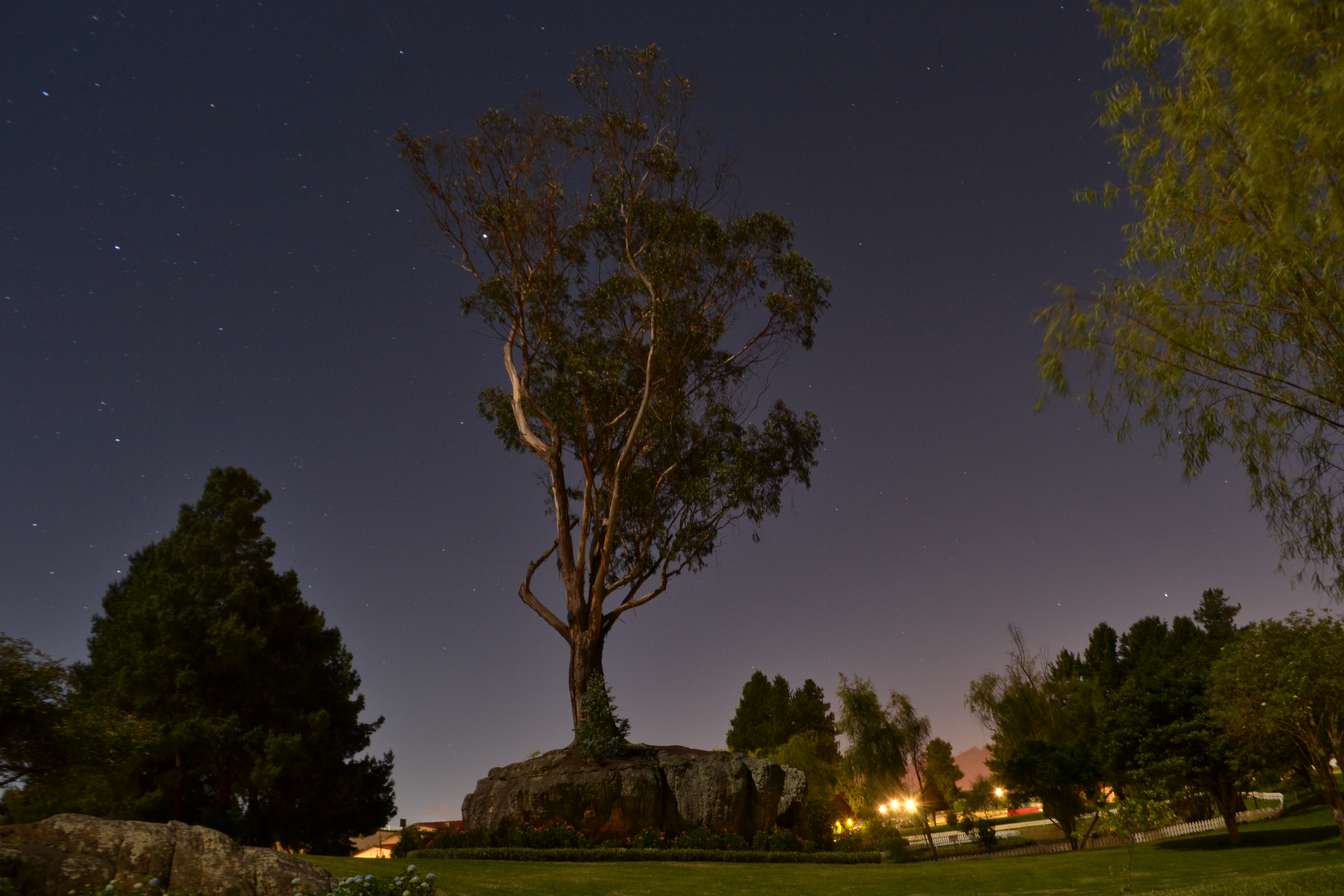 Esta fotografía fue tomada en el municipio colombiano con código 25269.